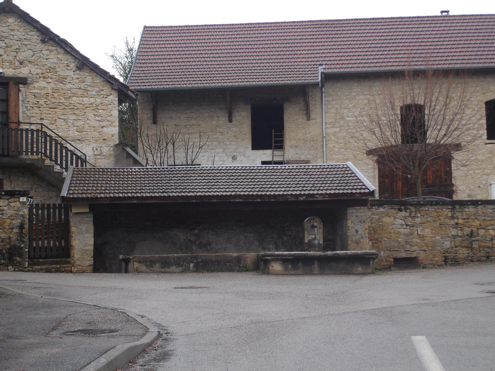 Vénérieu (38) : La fontaine